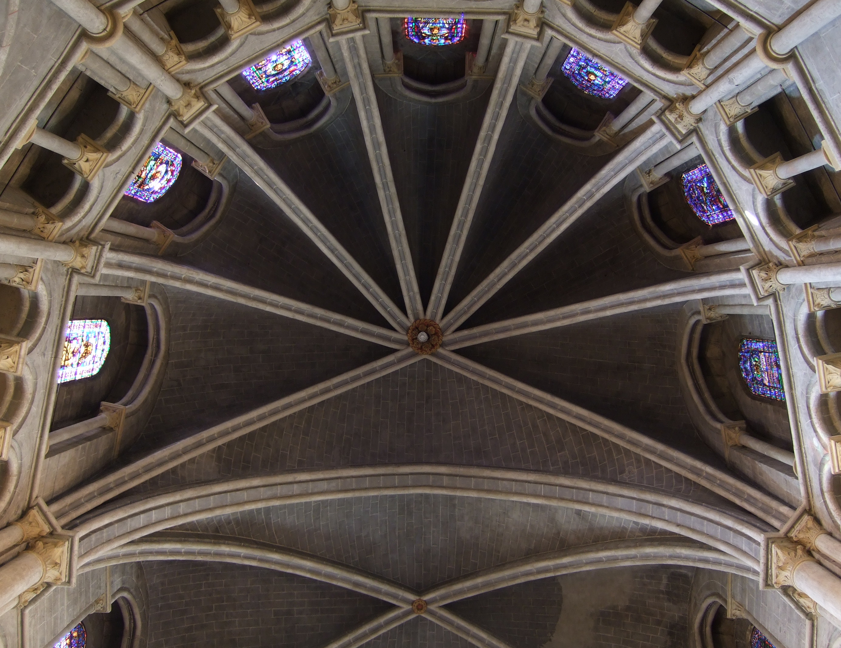 Ceiling of the choir of the Cathedral of Lausanne, Switzerland